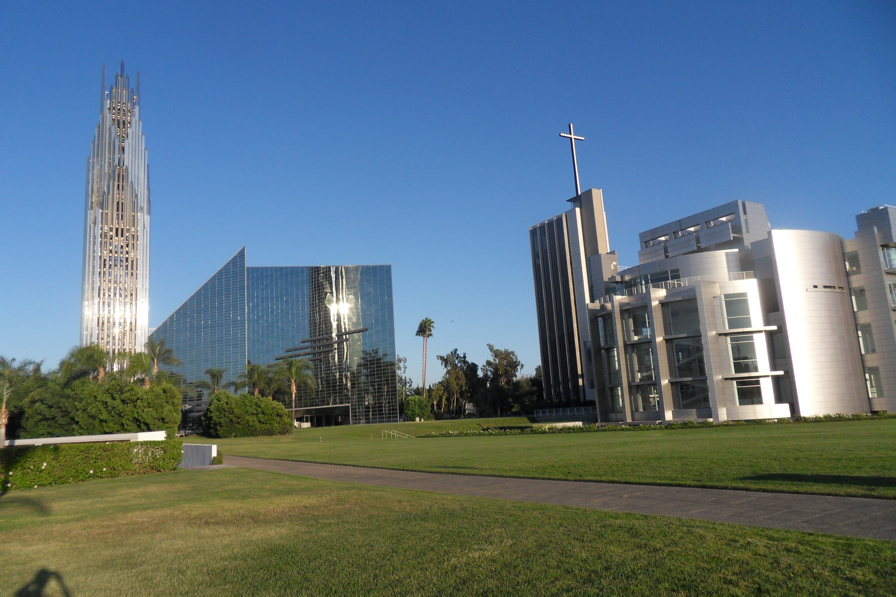 Crystal Cathedral en enkele gebouwen ernaast.